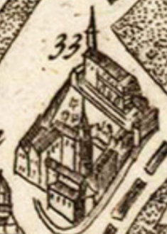 Dessin en noir et blanc représentant un pâté de bâtiments dont une église